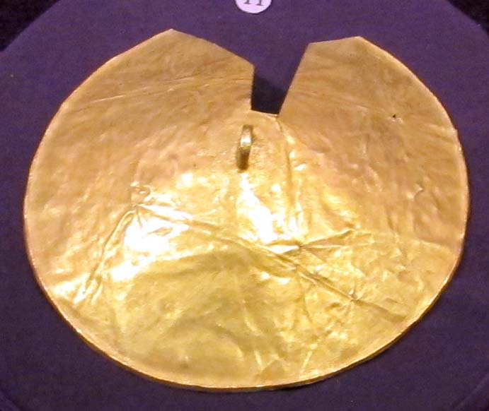 Eneolitico, coperchio di vasetto, V millennio ac.